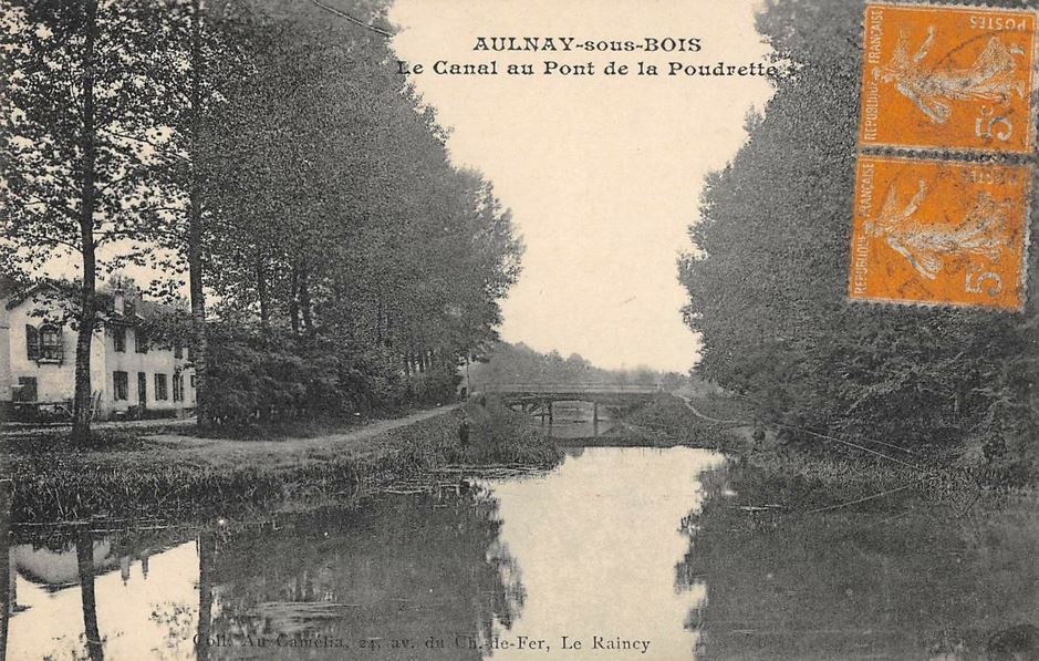 Aulnay-sous-Bois.Canal au pont de la Poudrette